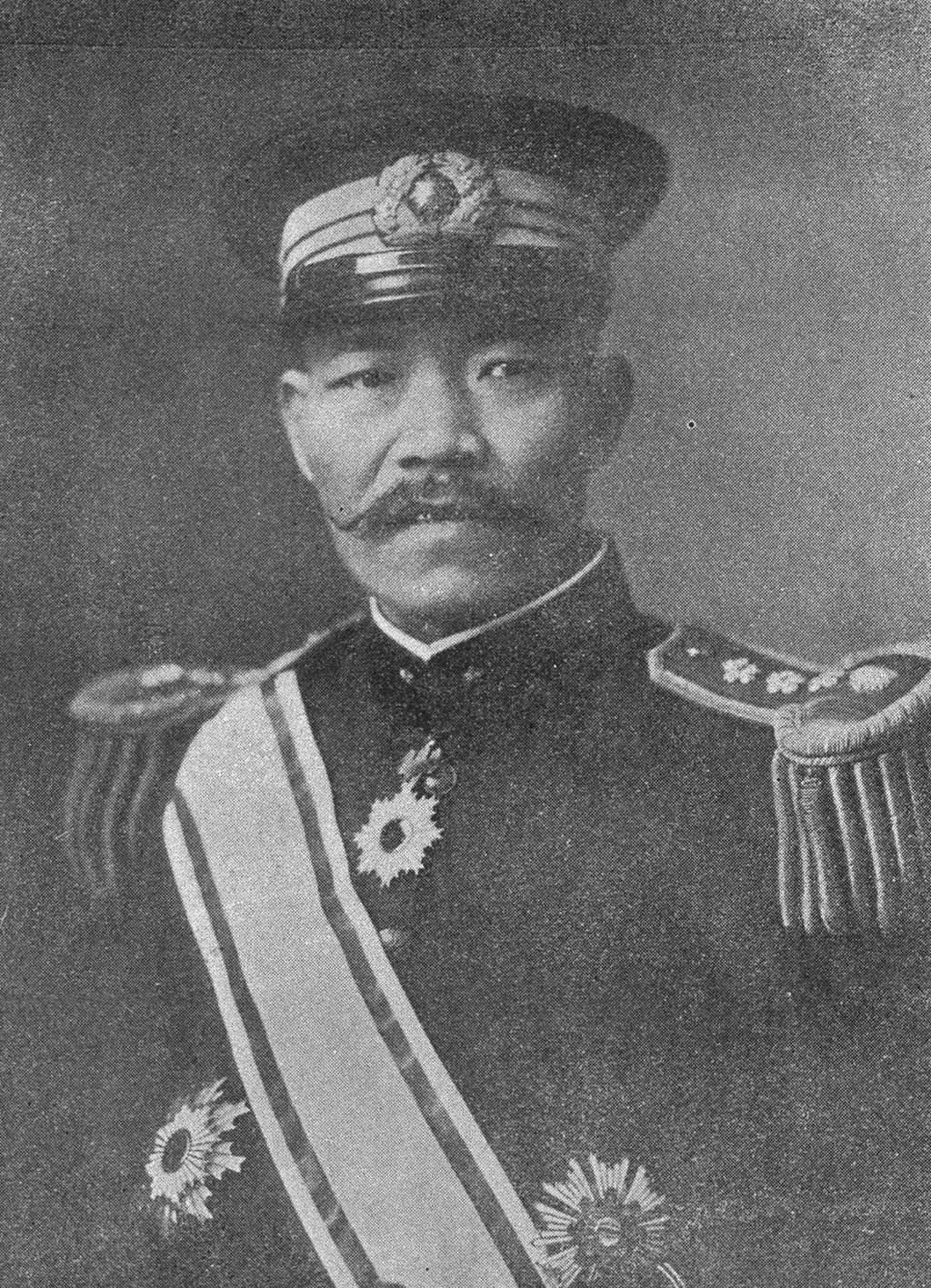 Portrait of Kamei Eizaburo (亀井英三郎, 1864 – 1913)